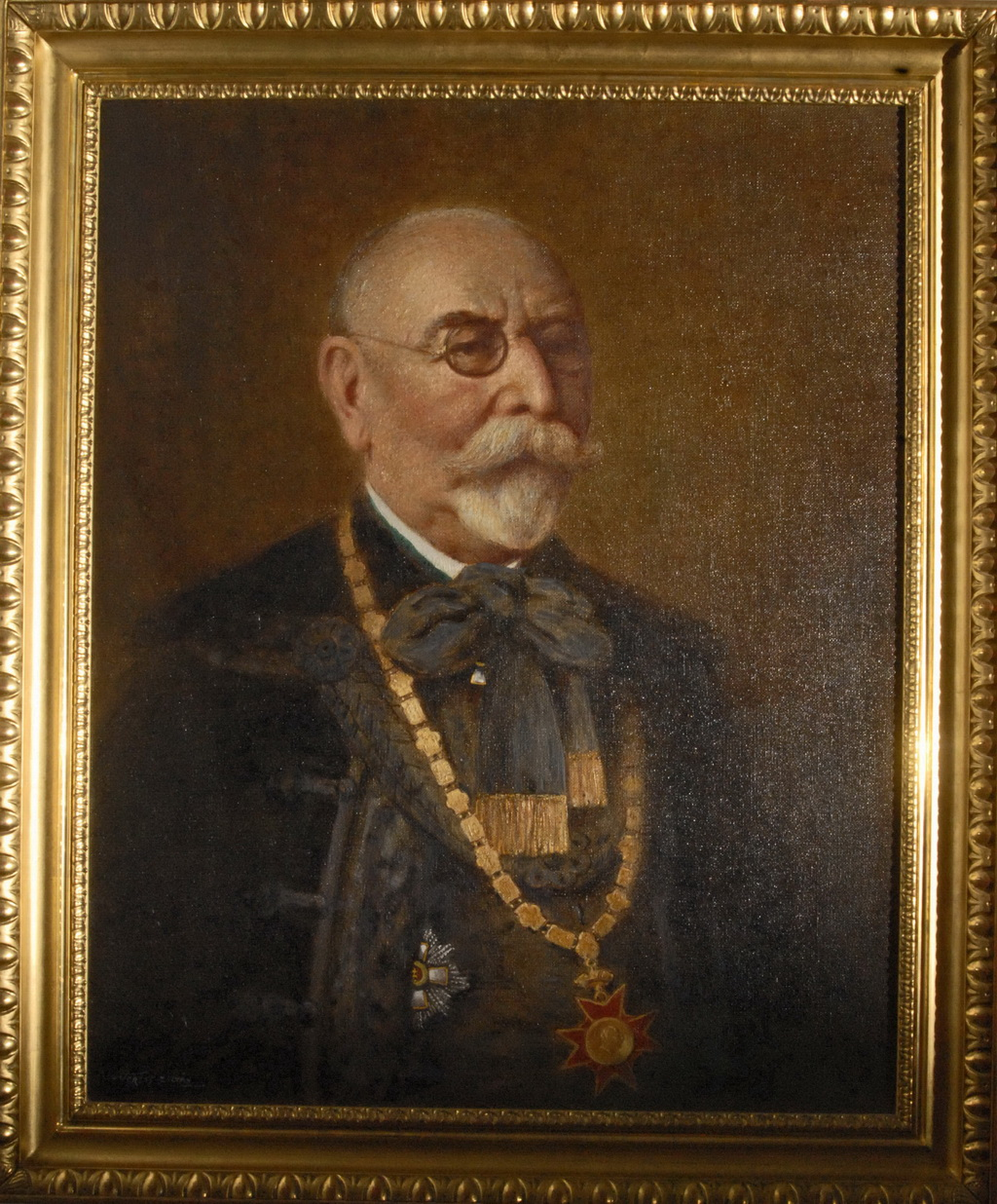 Veress Zoltán festménye Kenyeres Balázsról